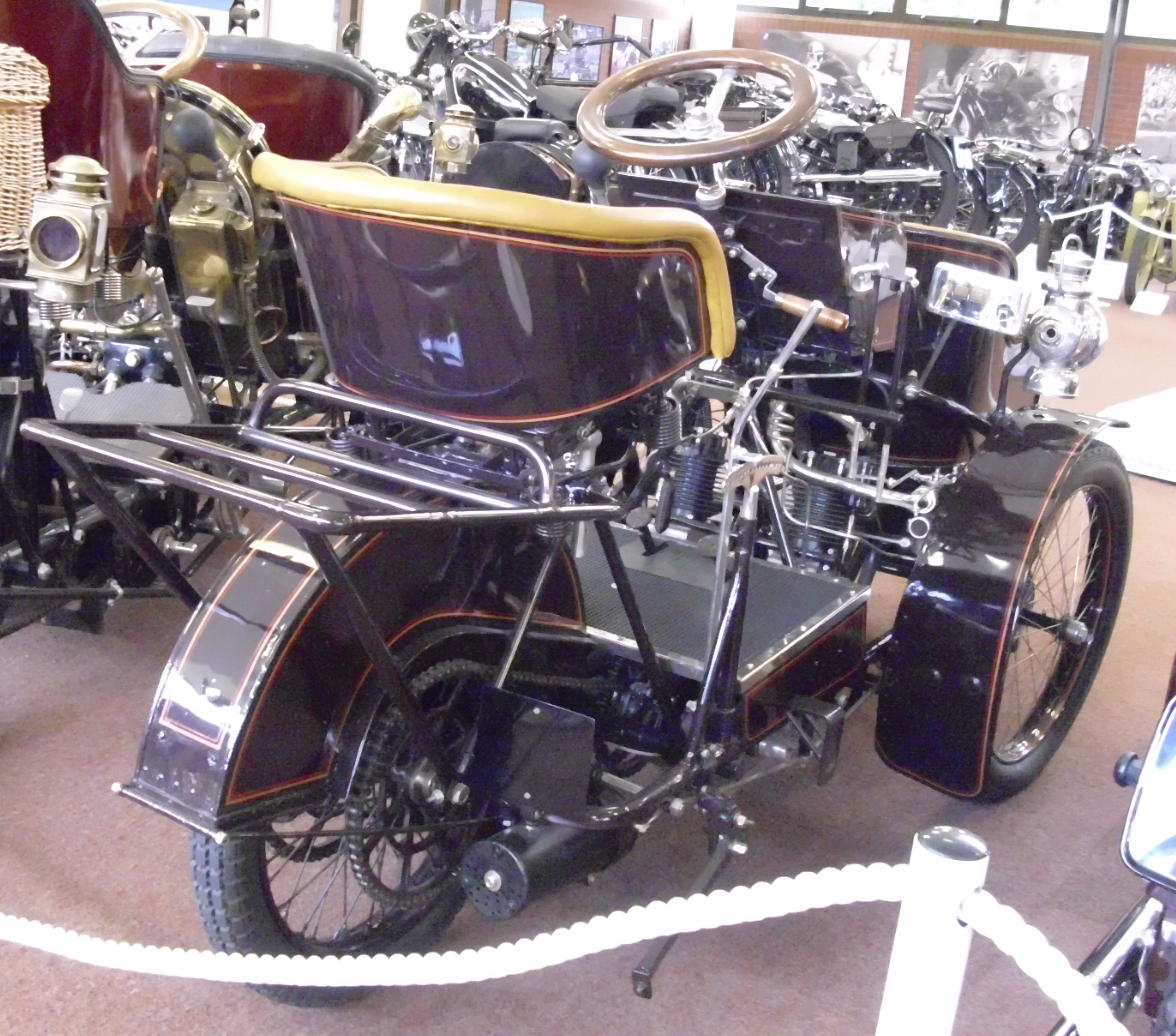 Quadrant Forecar 1904